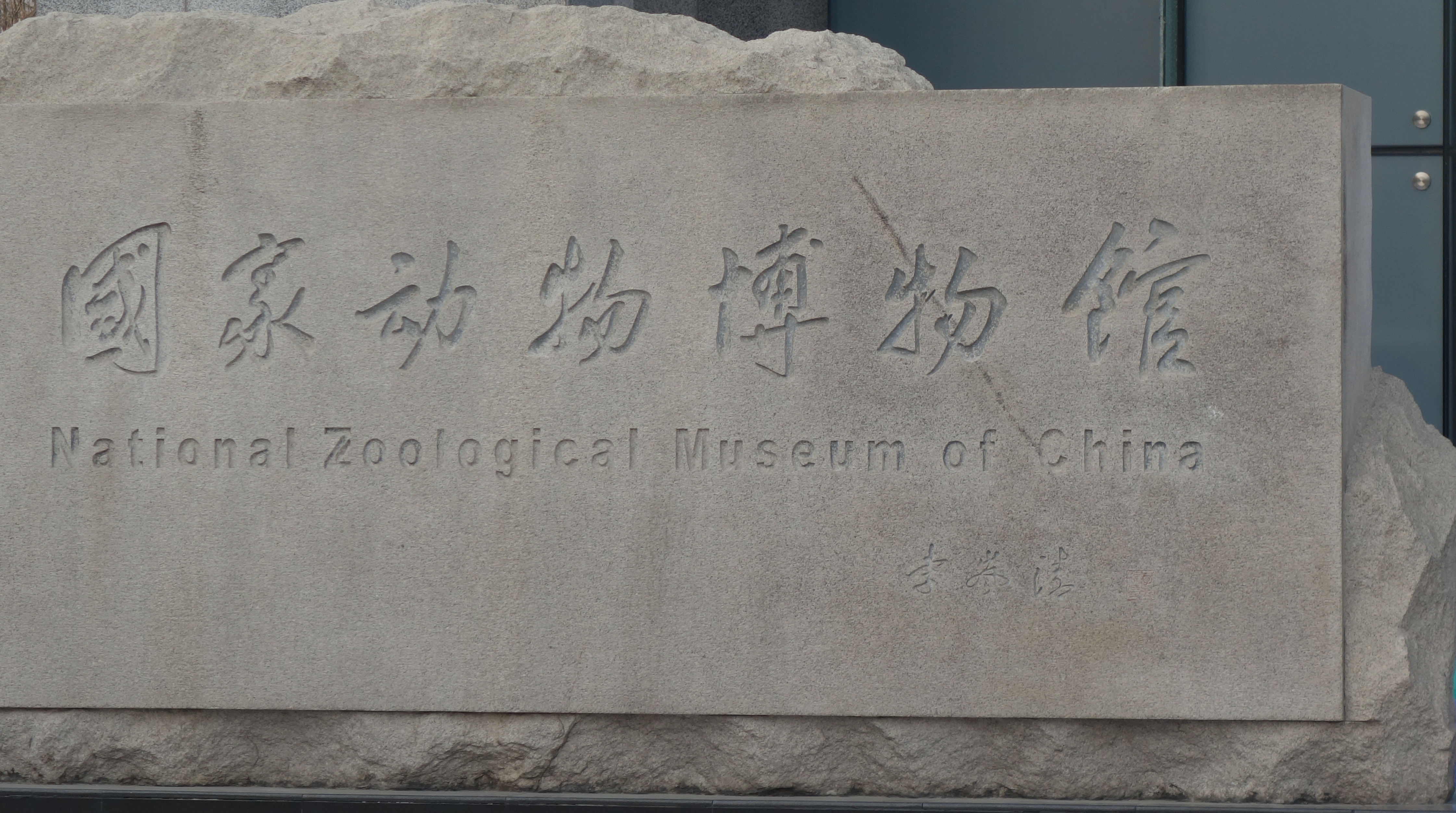 中文（中国大陆）: 中华人民共和国国家动物博物馆馆前碑